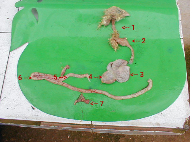 Walon: 7 organes d' on polet, limerotés : (1) buzea d' avala (2) gave u face; (3) djezî ; (4) estoumak vraiy (5) & (6) prumî ptit boyea (7) misse